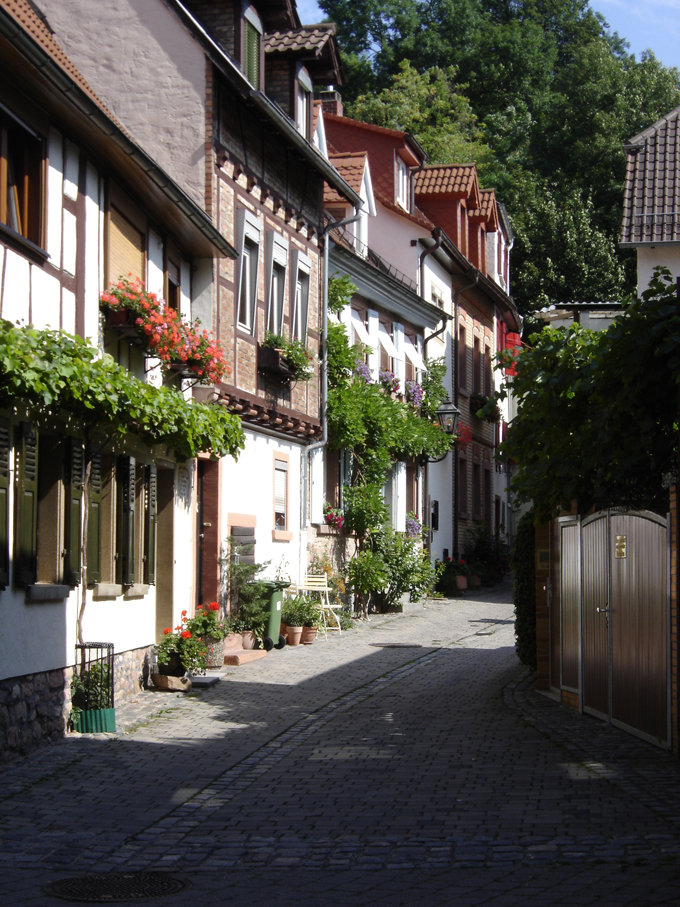 Bildbeschreibung: Eine der typischen Gassen der Altstadt in Weinheim Quelle: selbst fotografiert Fotograf/Zeichner: MSeses Datum: 2005